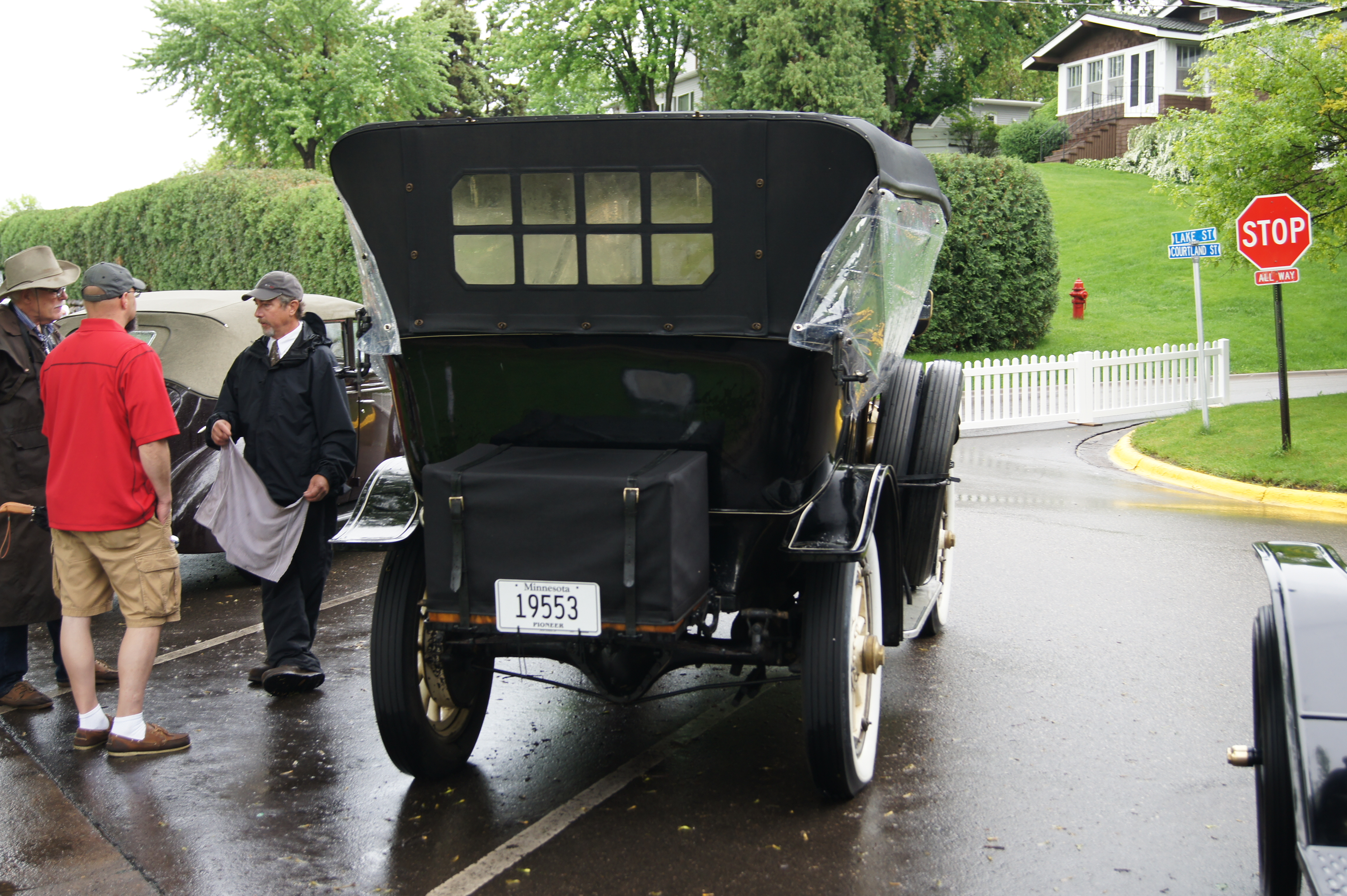 1912 Cadillac Model 30